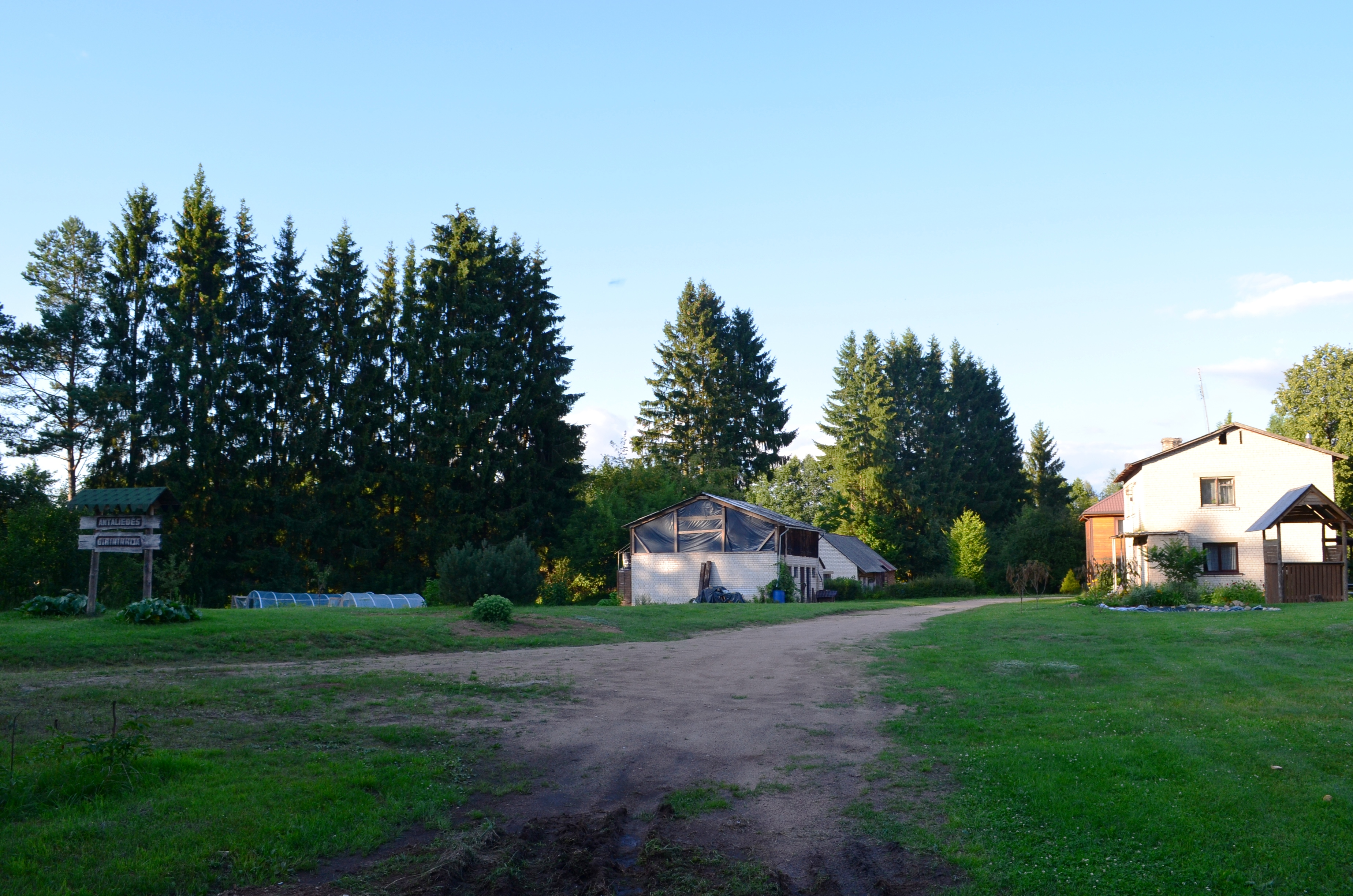 Girininkija, Antaliedės I k., Švenčionių sen., Švenčionių raj.